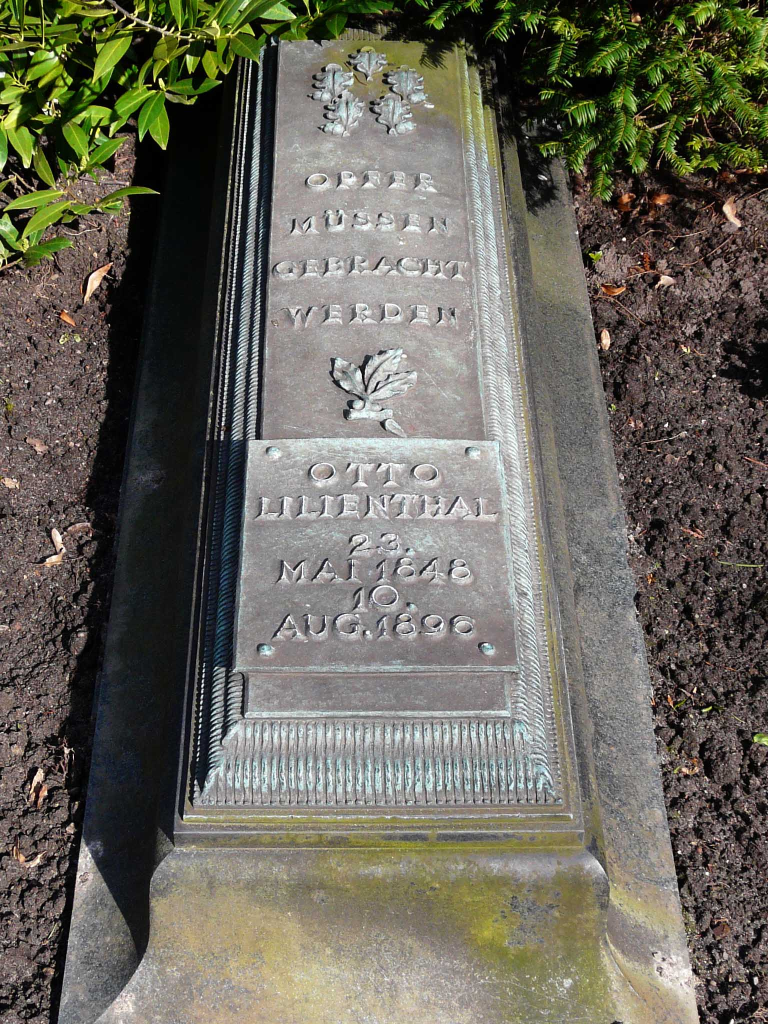 Grab von Otto Lilienthal auf dem Friedhof Lankwitz in Berlin